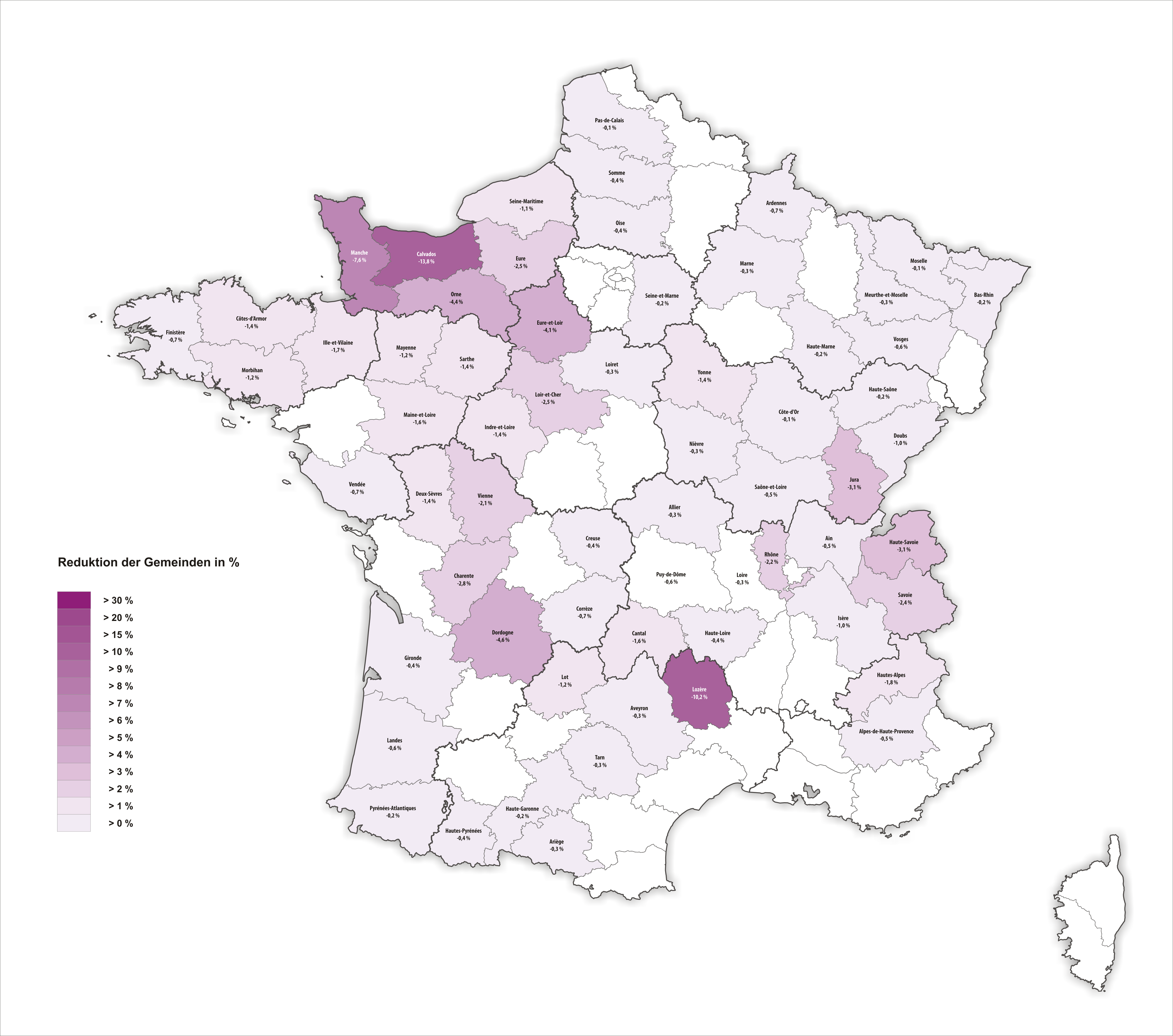 Reduktion der Gemeinden in Frankreich durch Fusionen pro Département 2017